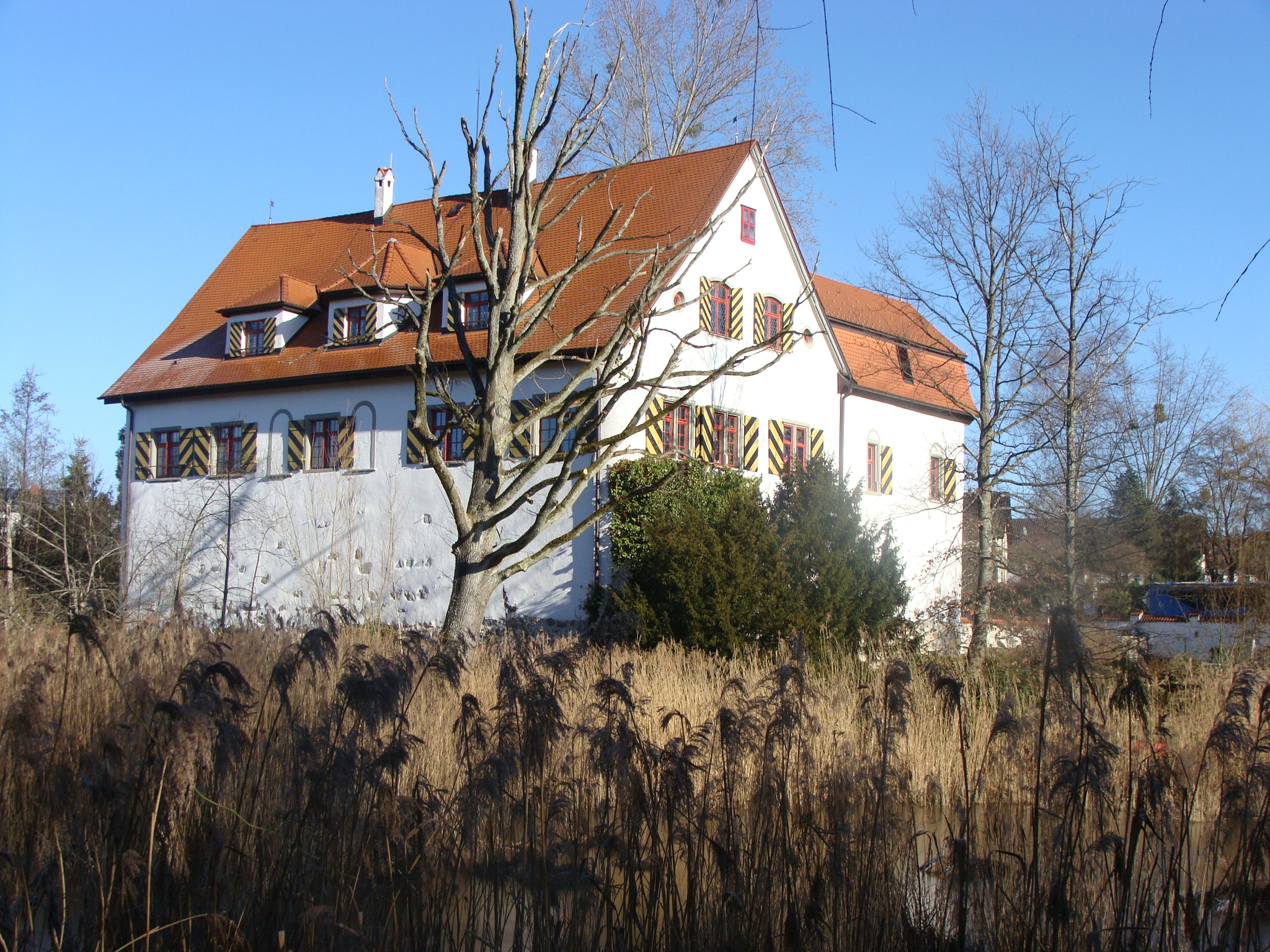 Blick über den Weiher auf Schloss Senftenau; Lindau im Bodensee